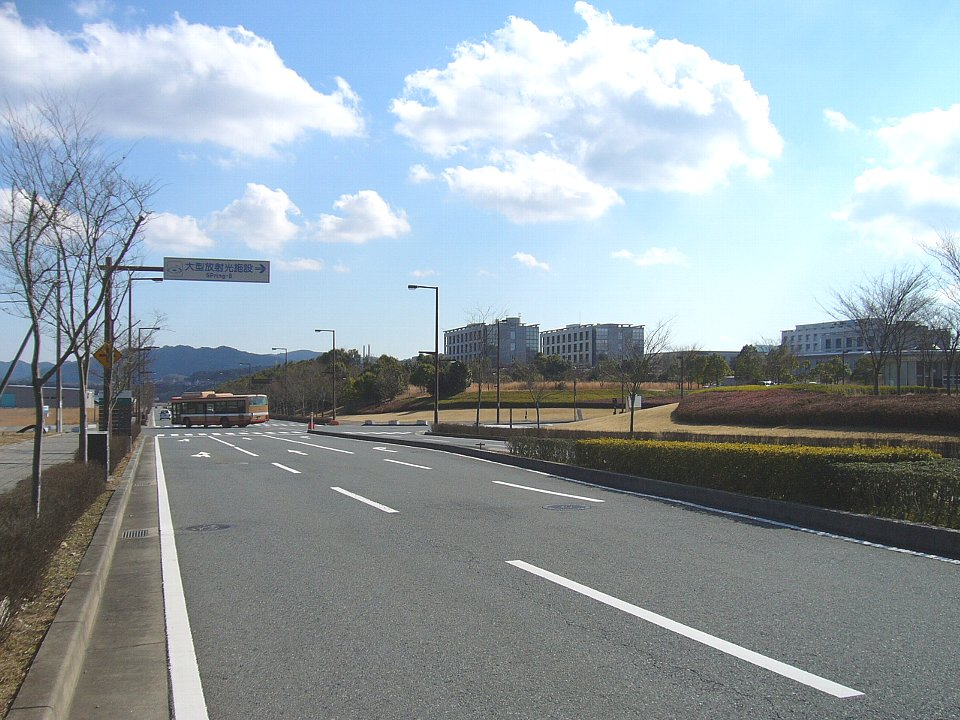 播磨科学公園都市 SPring-8付近（たつの市新宮町光都1丁目）